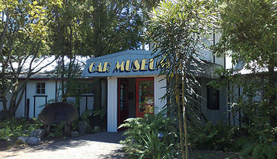 Yaldhurst Museum